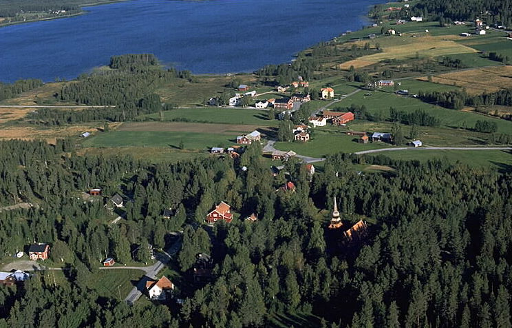 Håsjö gamla kyrka i bildens nedre del. Motiv: Håsjö Nyckelord: Flygbilder, Riksintressen Kategori: KyrkbyHåsjö gamla kyrka i bildens nedre del.